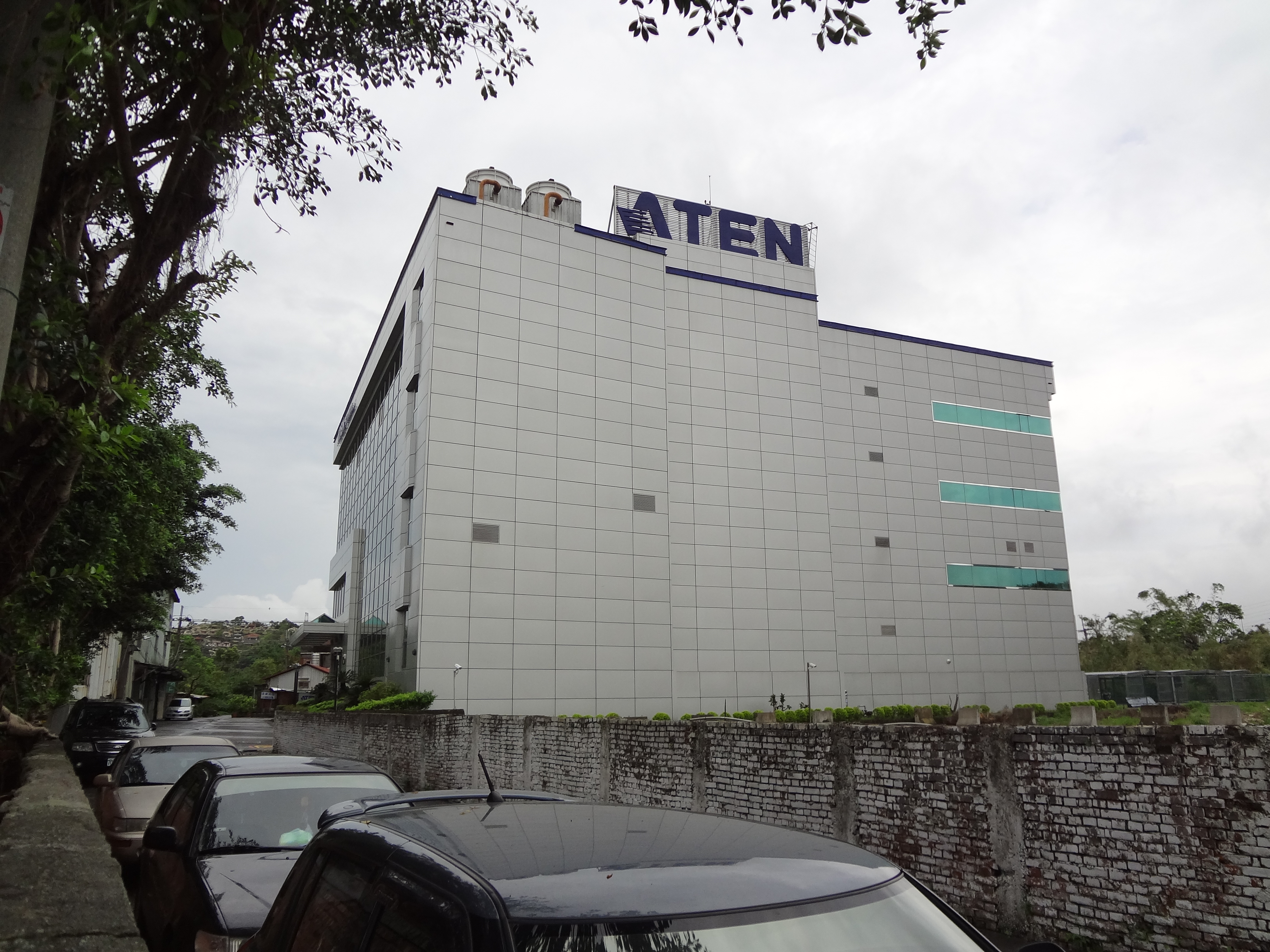 宏正自動科技汐萬廠，位於新北市汐止區新江北路30巷20號。